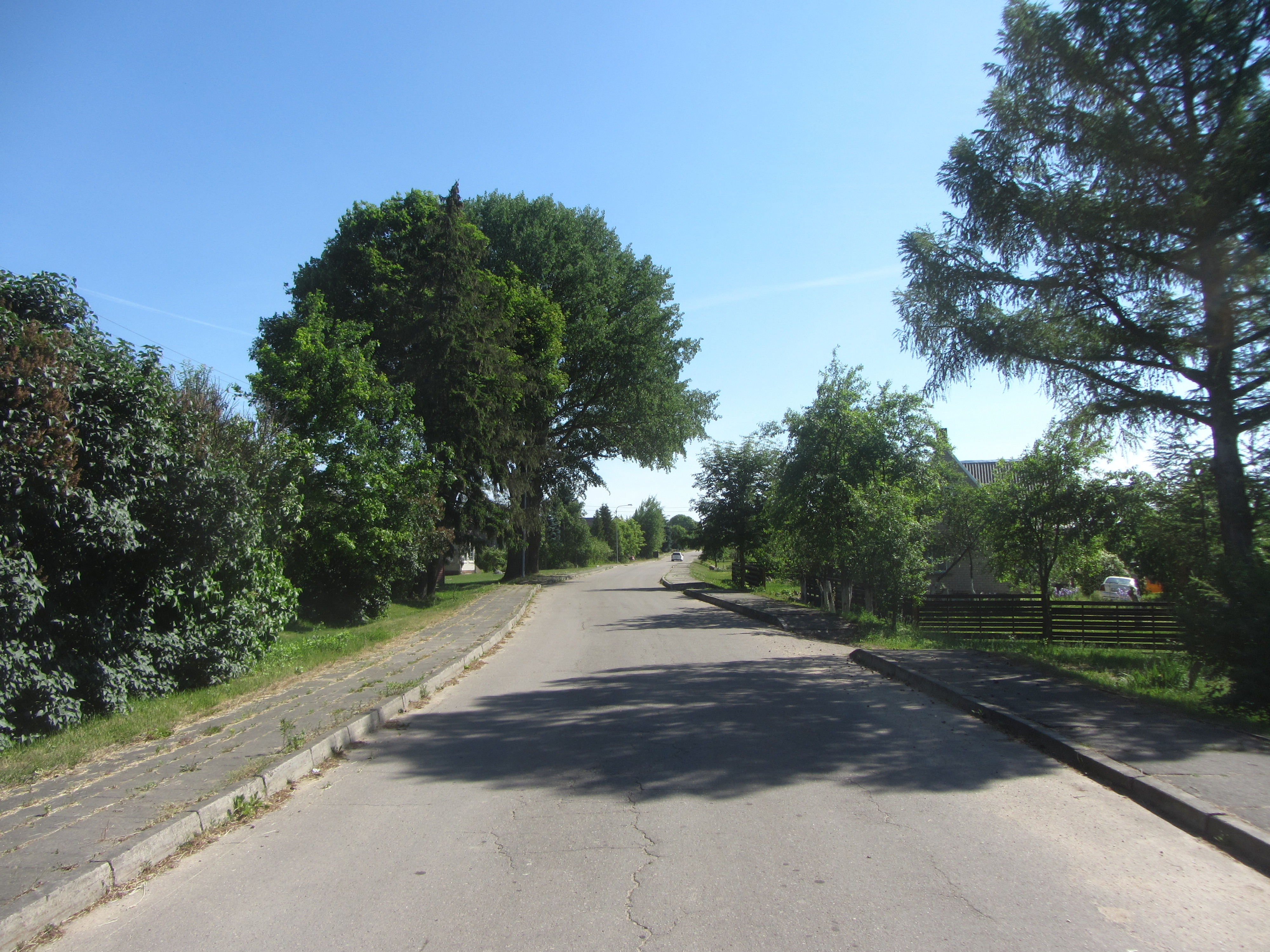 Pakertai, Lithuania